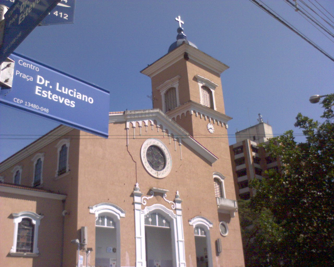 Catedral de Limeira